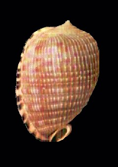 Cypraeacassis testiculus del Archipiélago Los Roques, Dependencias Federales - Venezuela.